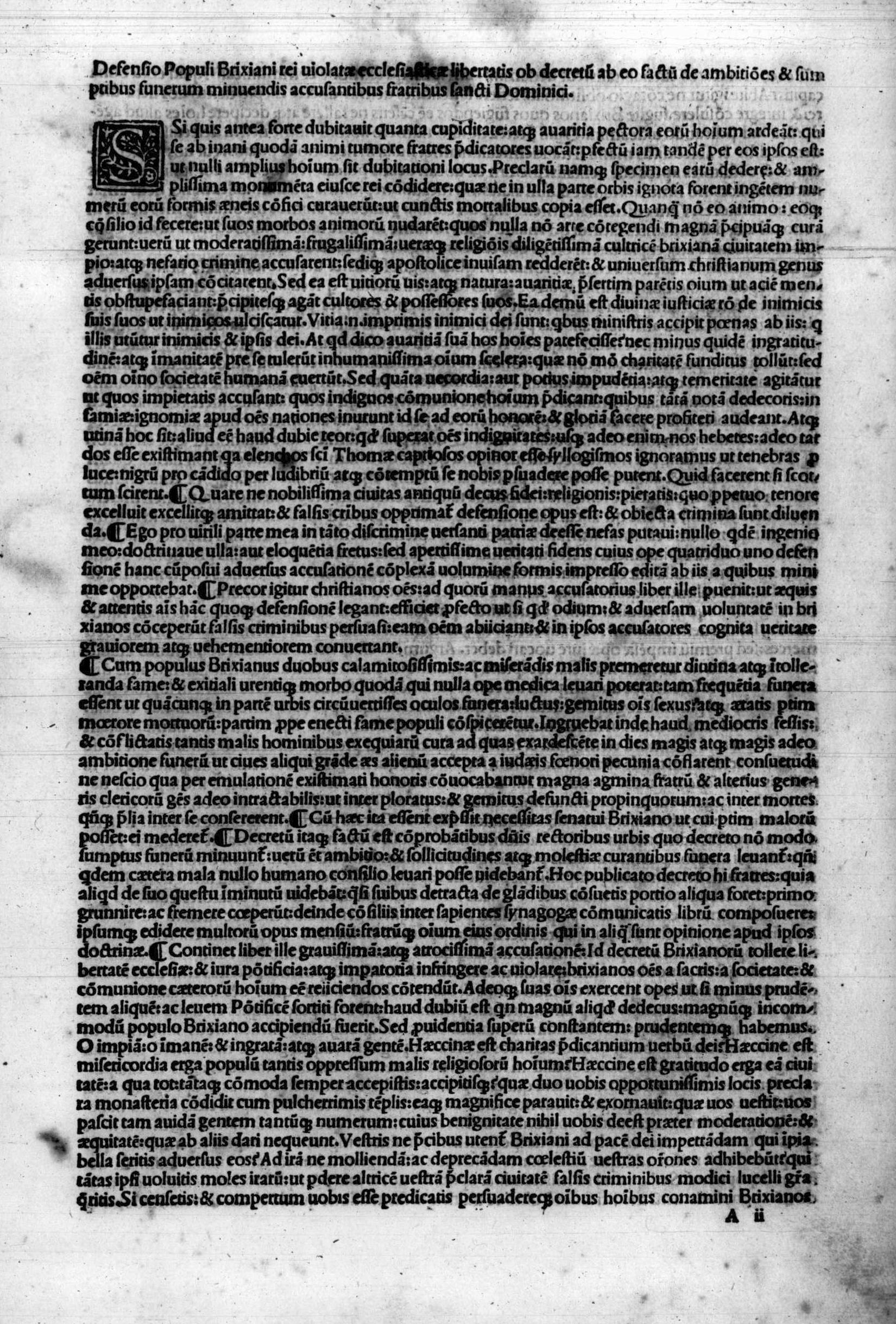 pagina